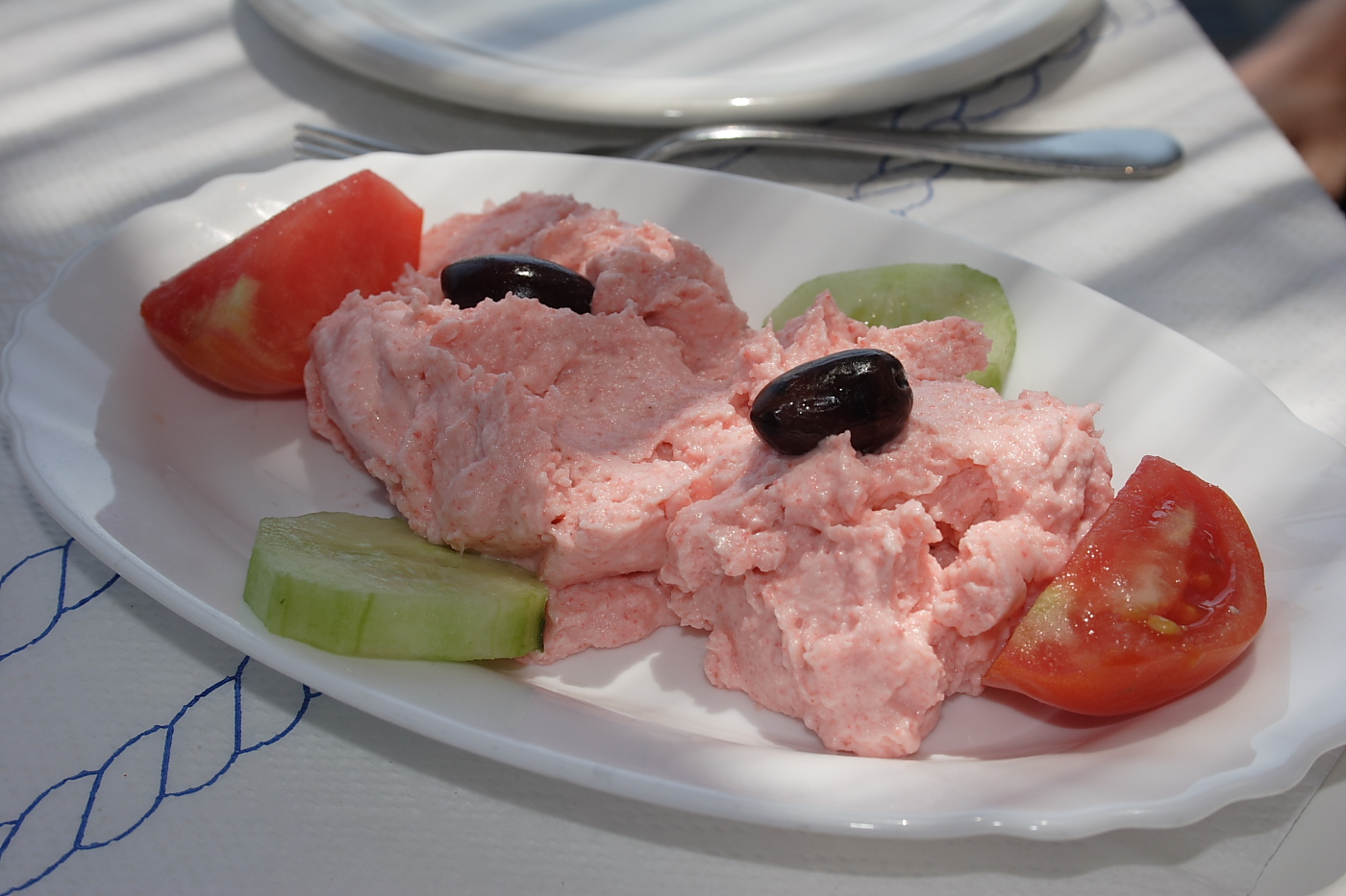 Taramosalata - roe salat